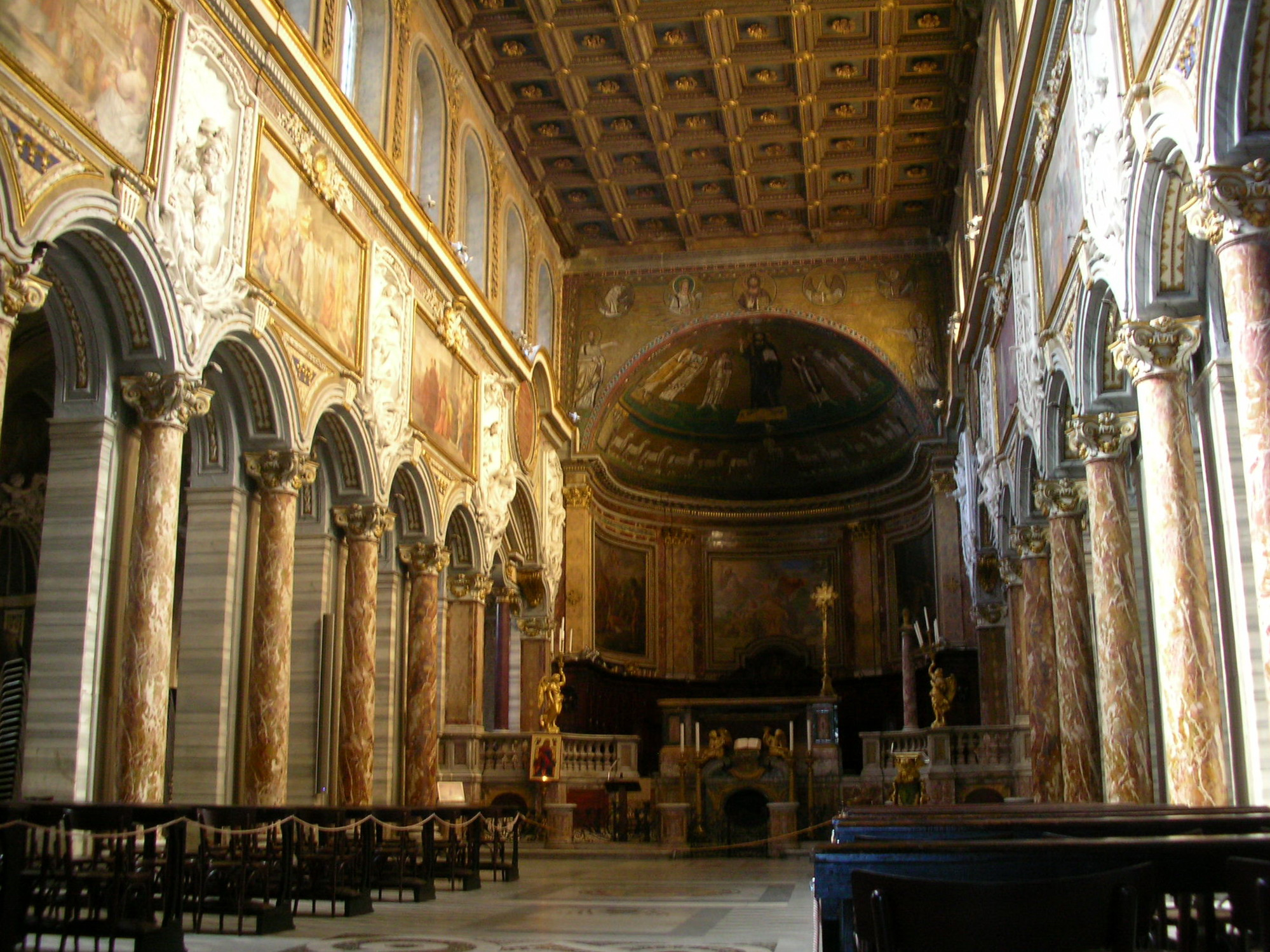 Interior, San Marco, Rome